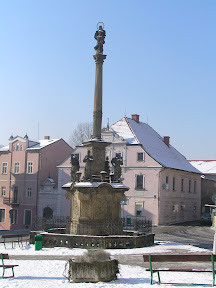 Sloup se sochou Panny Marie, Benešov nad Ploučnicí.